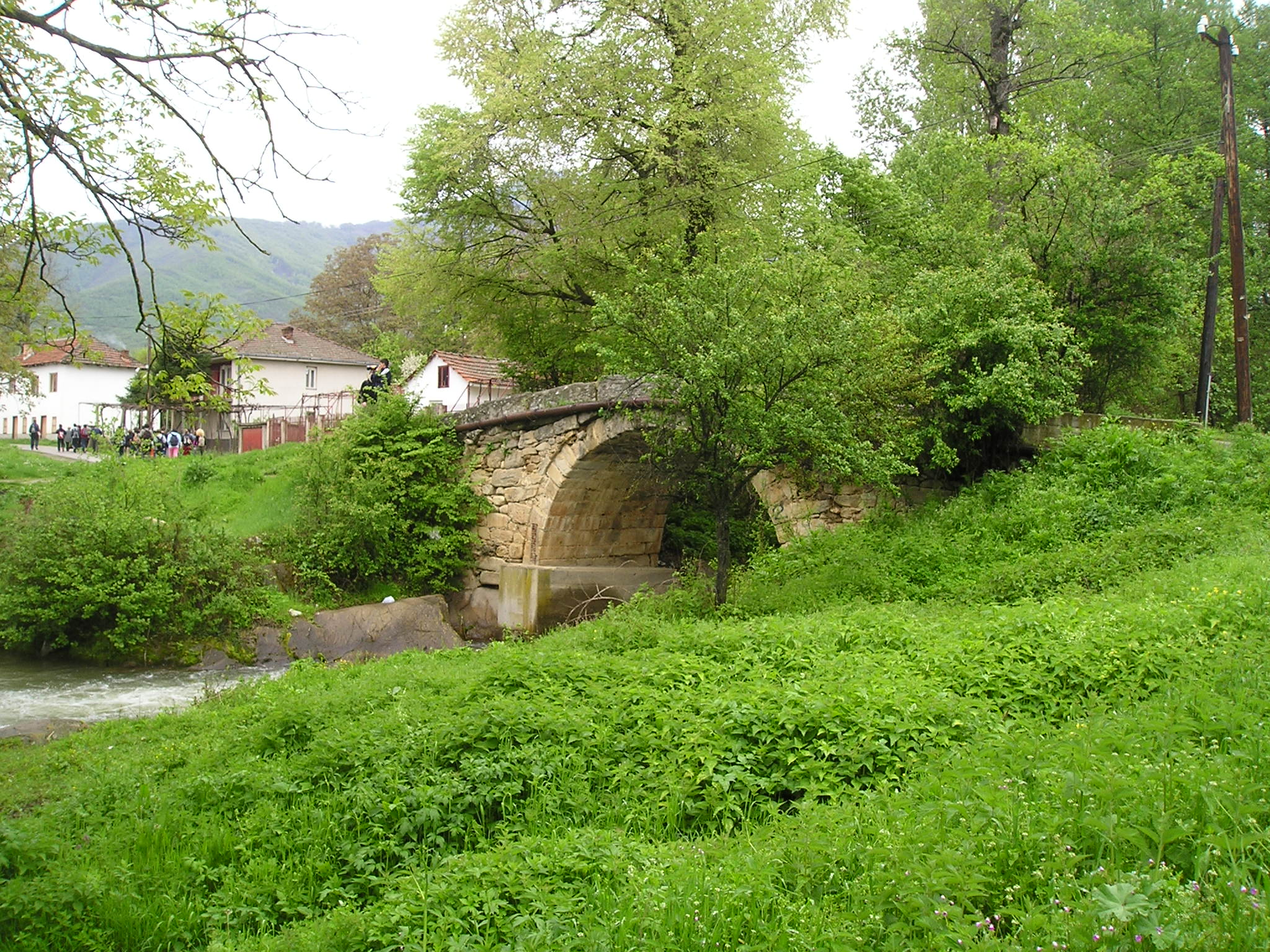 The old stone bridge on Babuna river in the village of Bogomila, R.o.Macedonia Стариот камен мост на Бабуна на влезот на селото Богомила, Македонија Stary kamienny most na rzece Bauna we wsi Bogomila, Macedonia